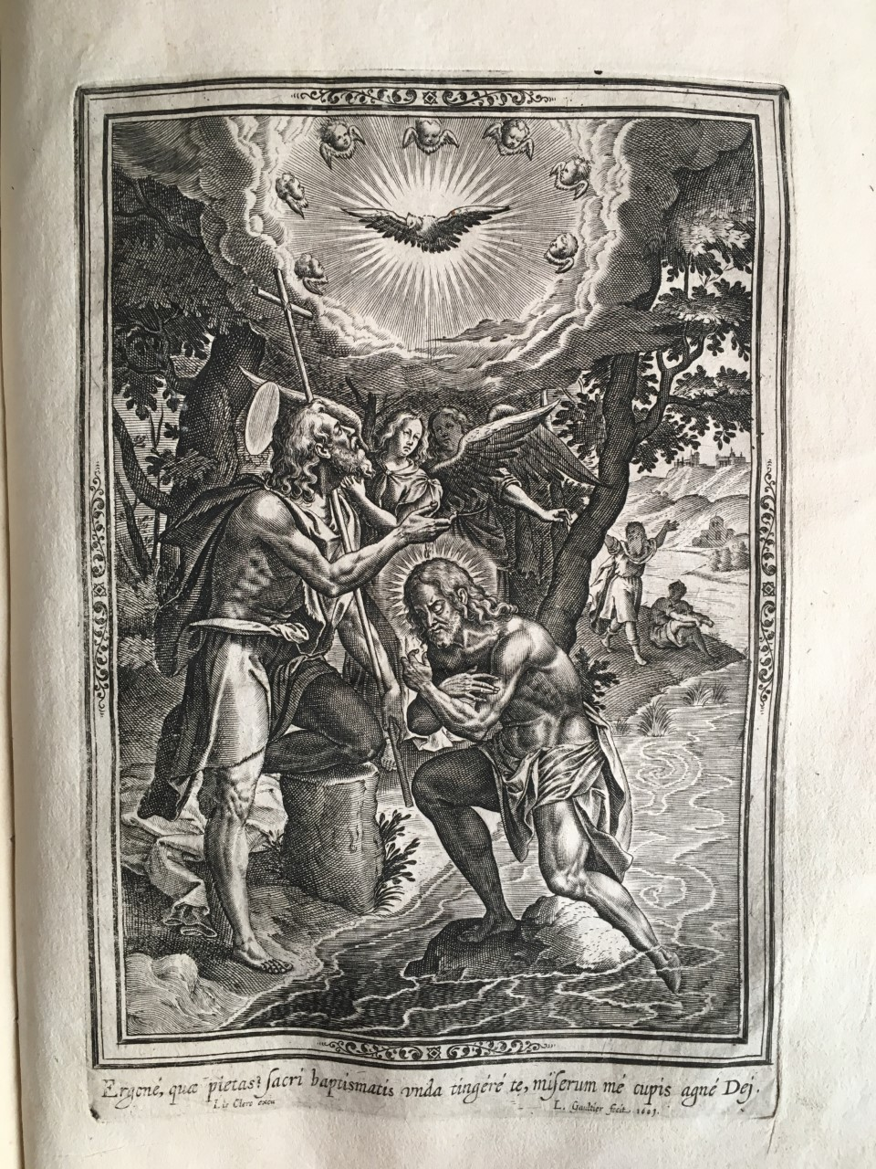 Image du Batême du Christ relationé avec une peinture du Murillo.